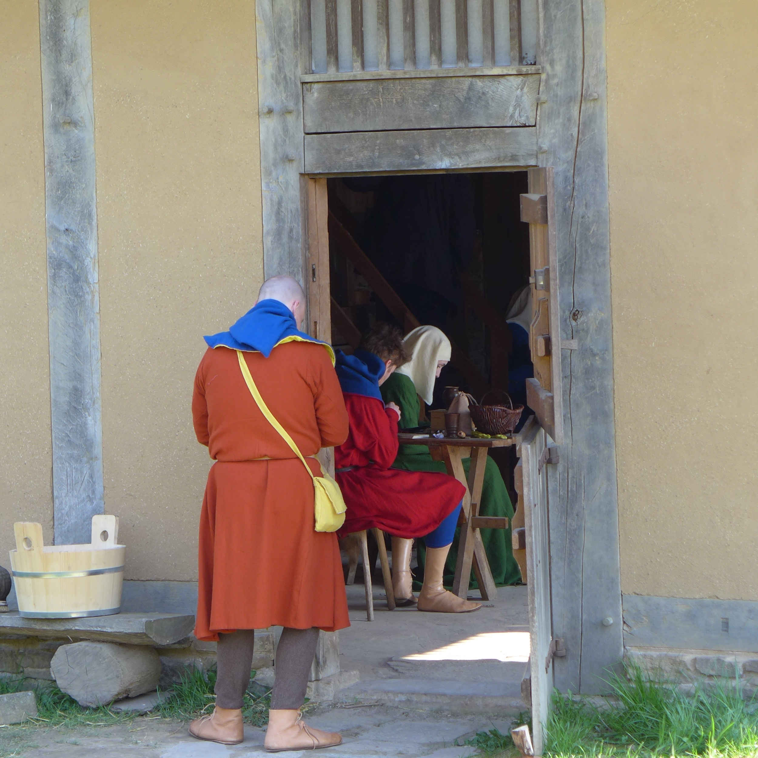 am und im Mittelalterhaus